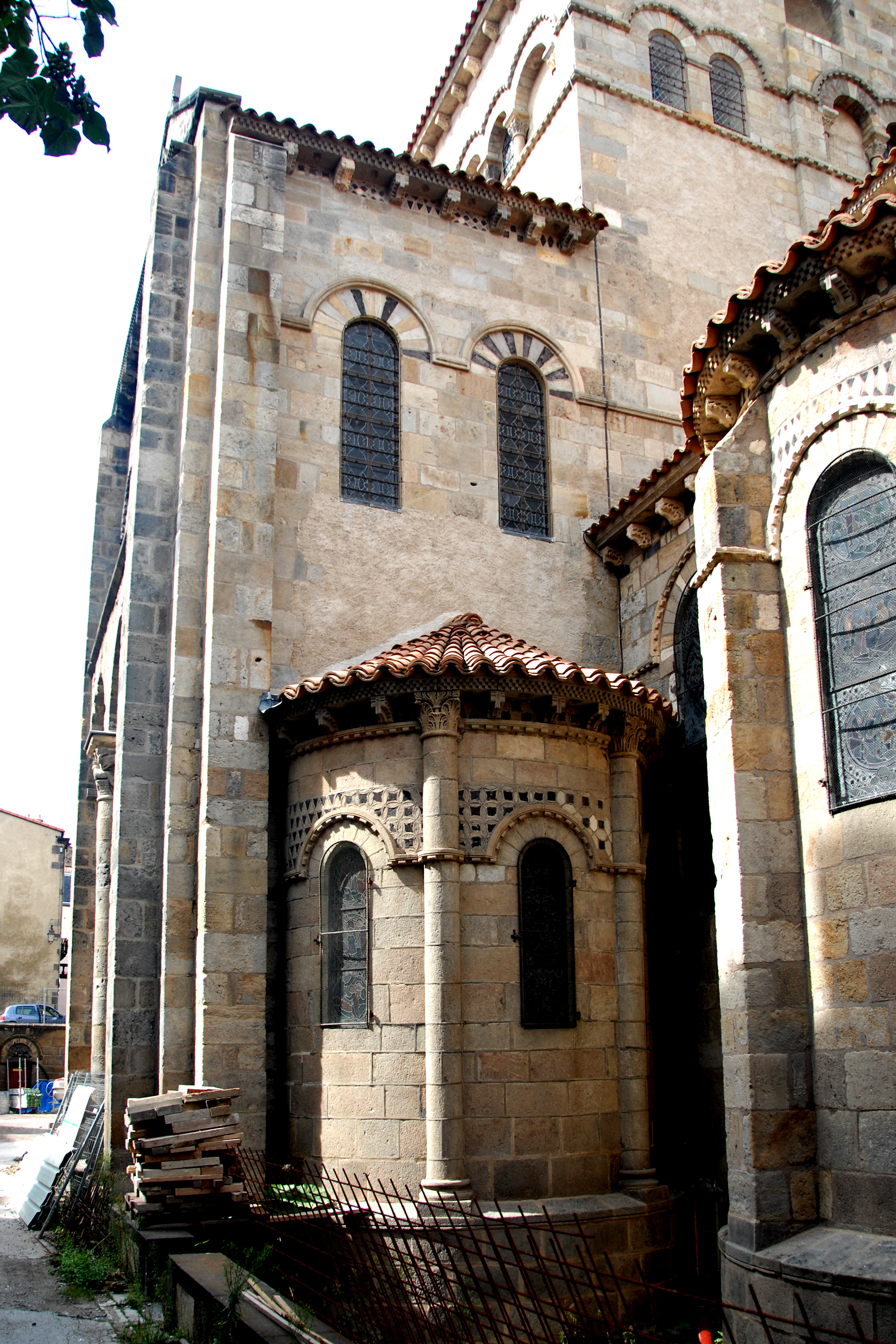 Notre-Dame du port, südl. Querhausarm von Osten